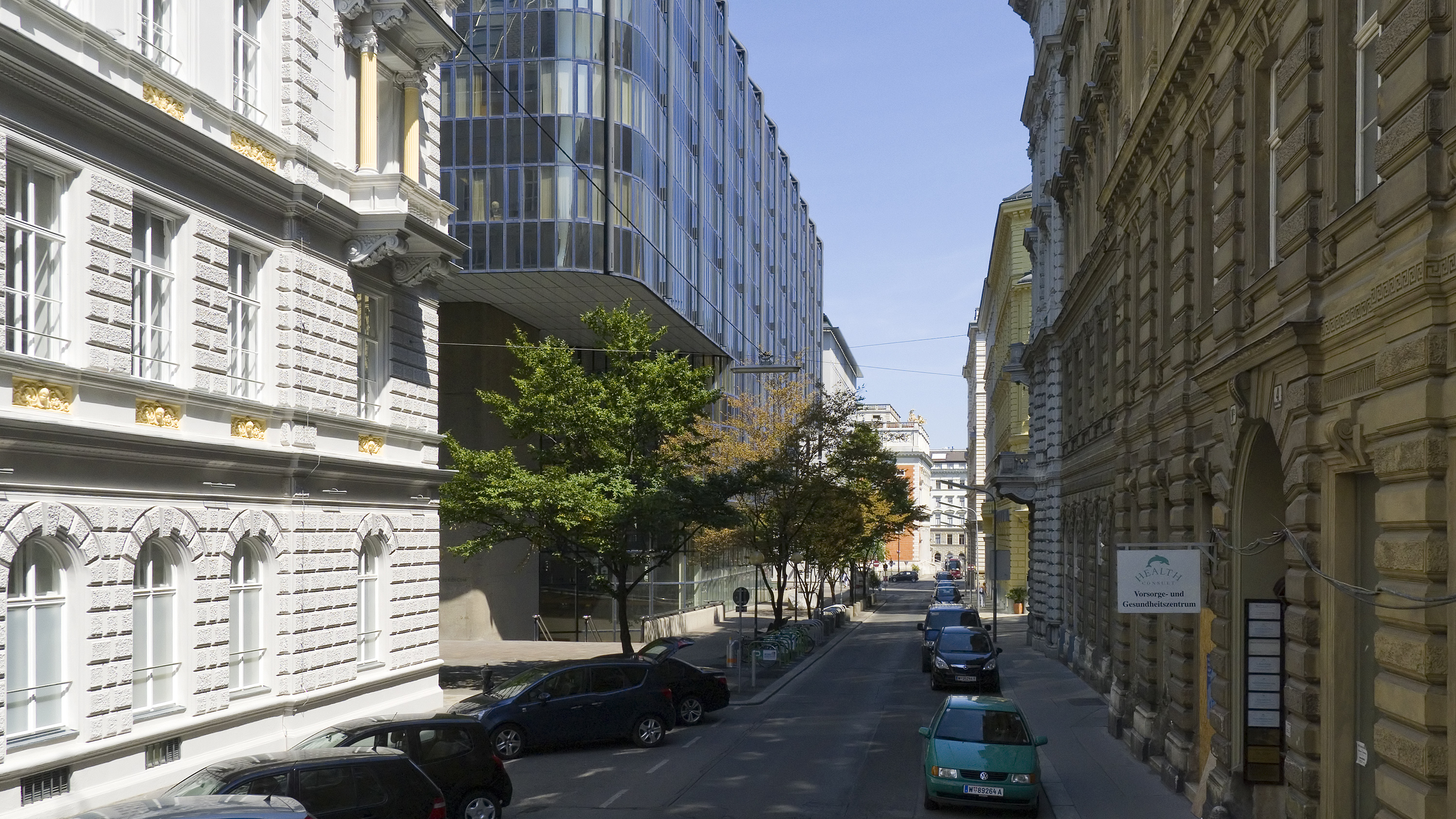 Helferstorferstraße in Wien 1 bei Nr. 7 Richtung Nordosten